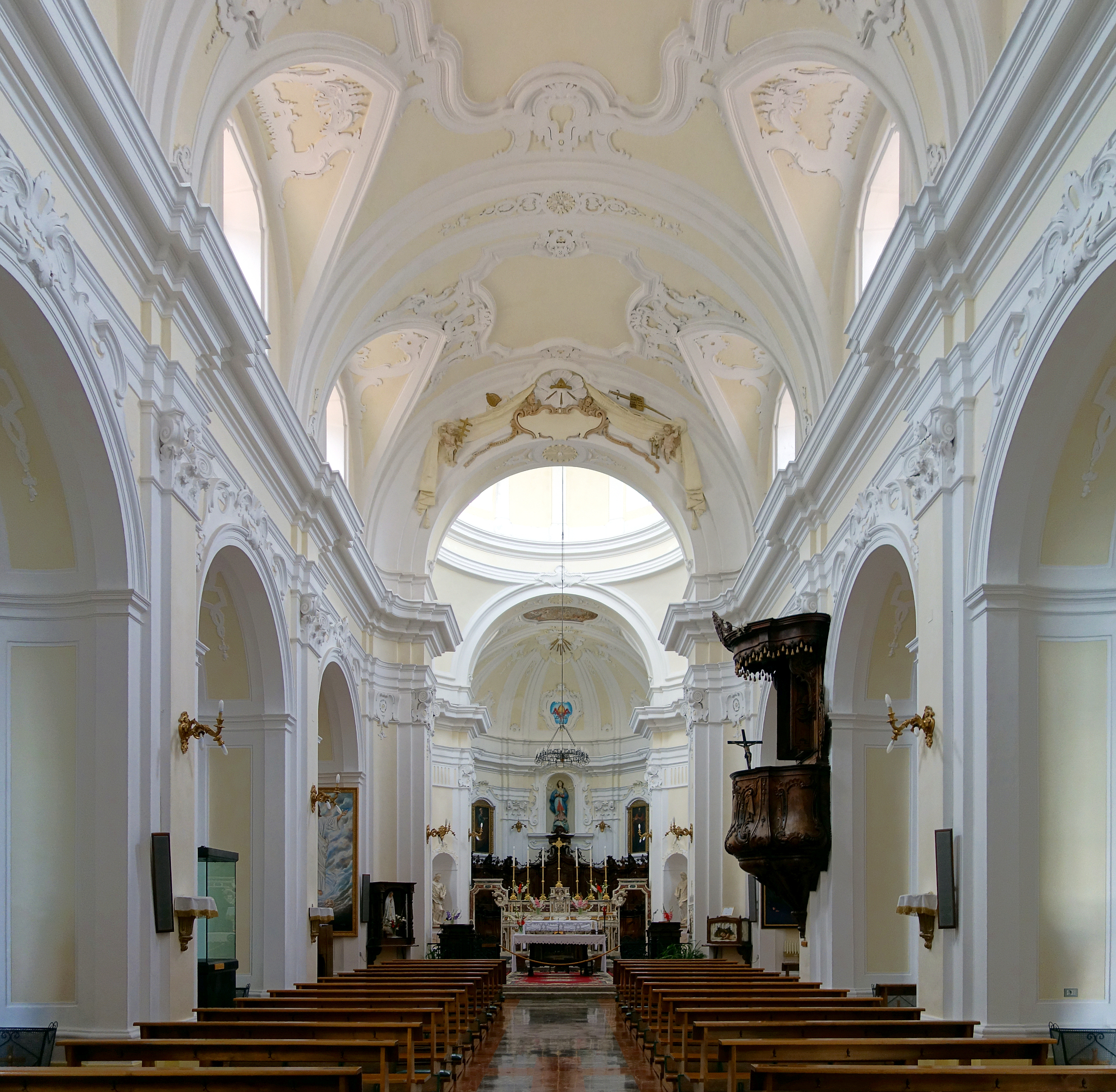 La nef de la chiesa madre de Morano Calabro.